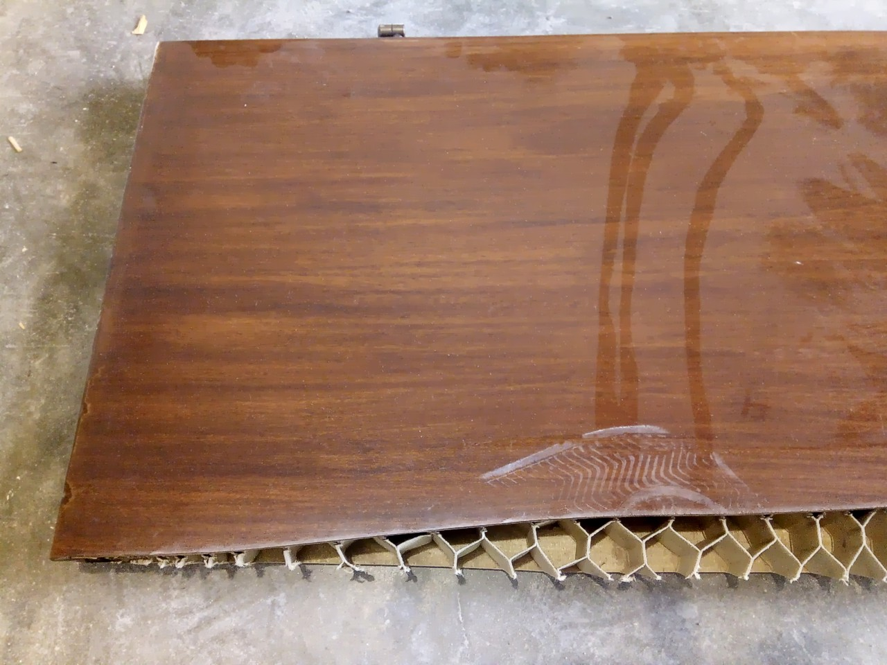 Porta tamburata tagliata, è possibile vedere la struttura interna a nido d'ape che riempie la struttura della porta e permette ai pannelli laterali di non soccombere a pressioni esterne